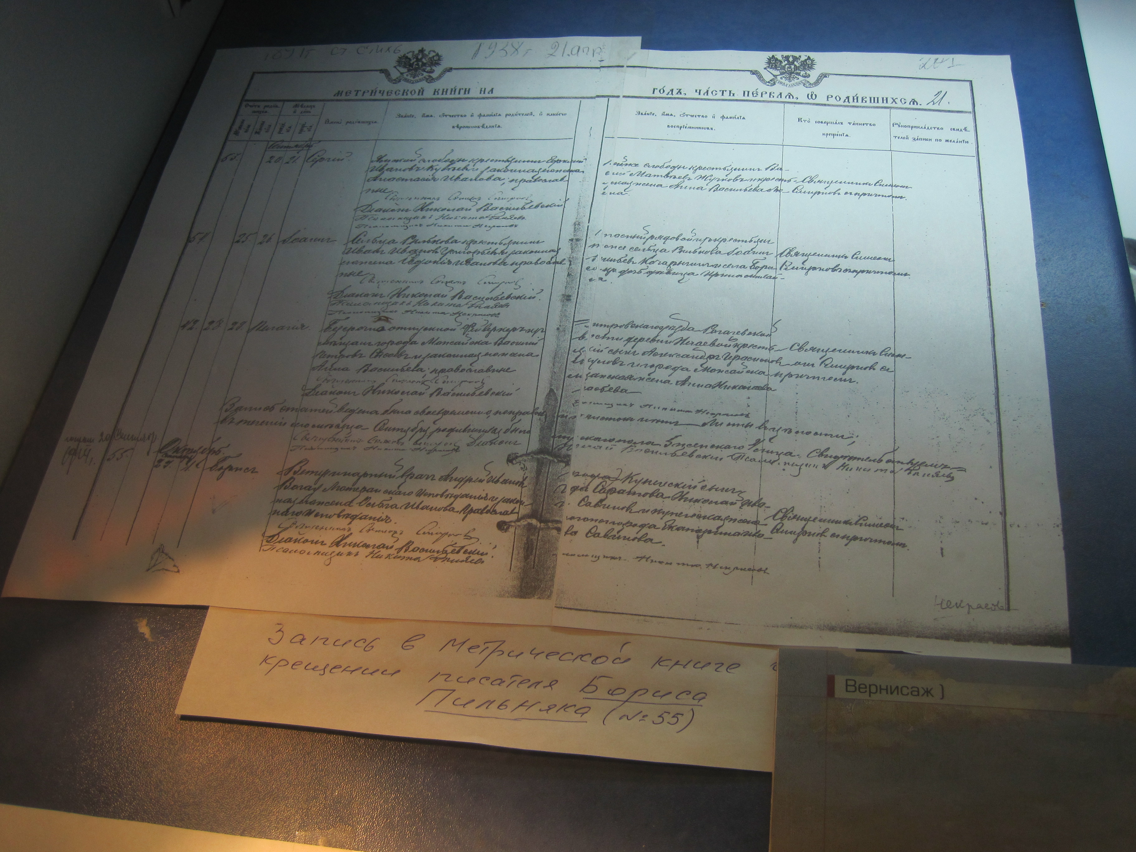 Метрическая запись о рождении Б. Пильняка